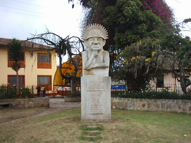 Escultura del Zipa meditando ubicada en la plaza central del municipio de Zipacón (Cundinamarca) Ubicación: ZIPACON, CUNDINAMARCA